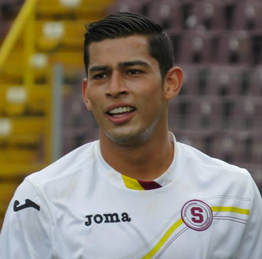 22-10-2013. Ariel Rodríguez entrenando para el Deportivo Saprissa.